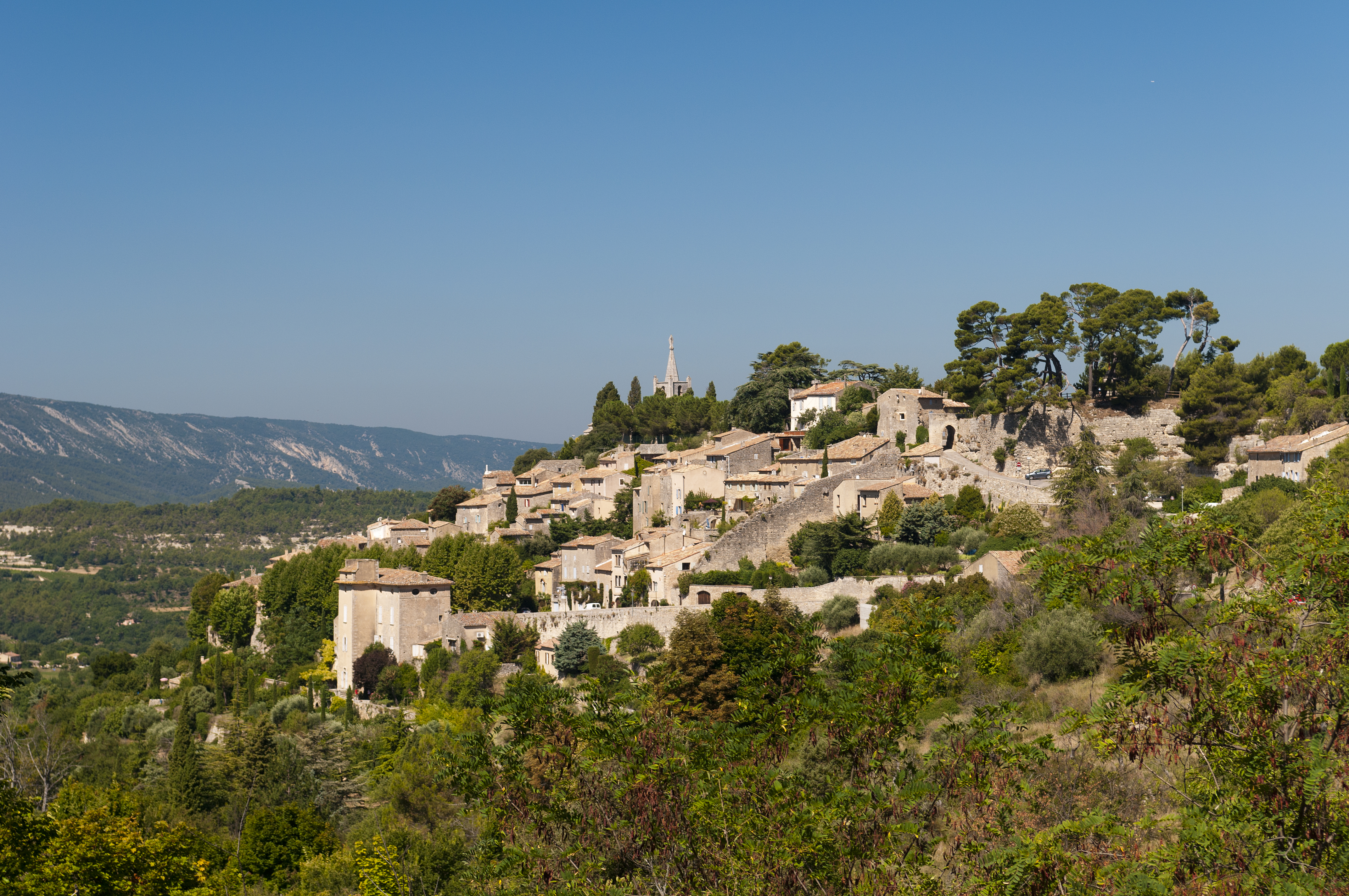 Bonnieux, Provence, France